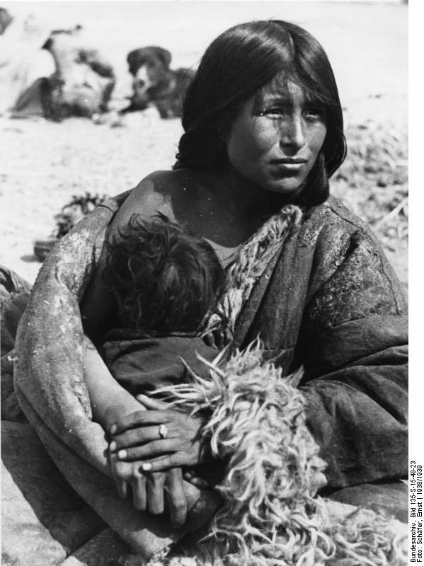 Lhasa, Ngoloklager, Mutter mit Kind